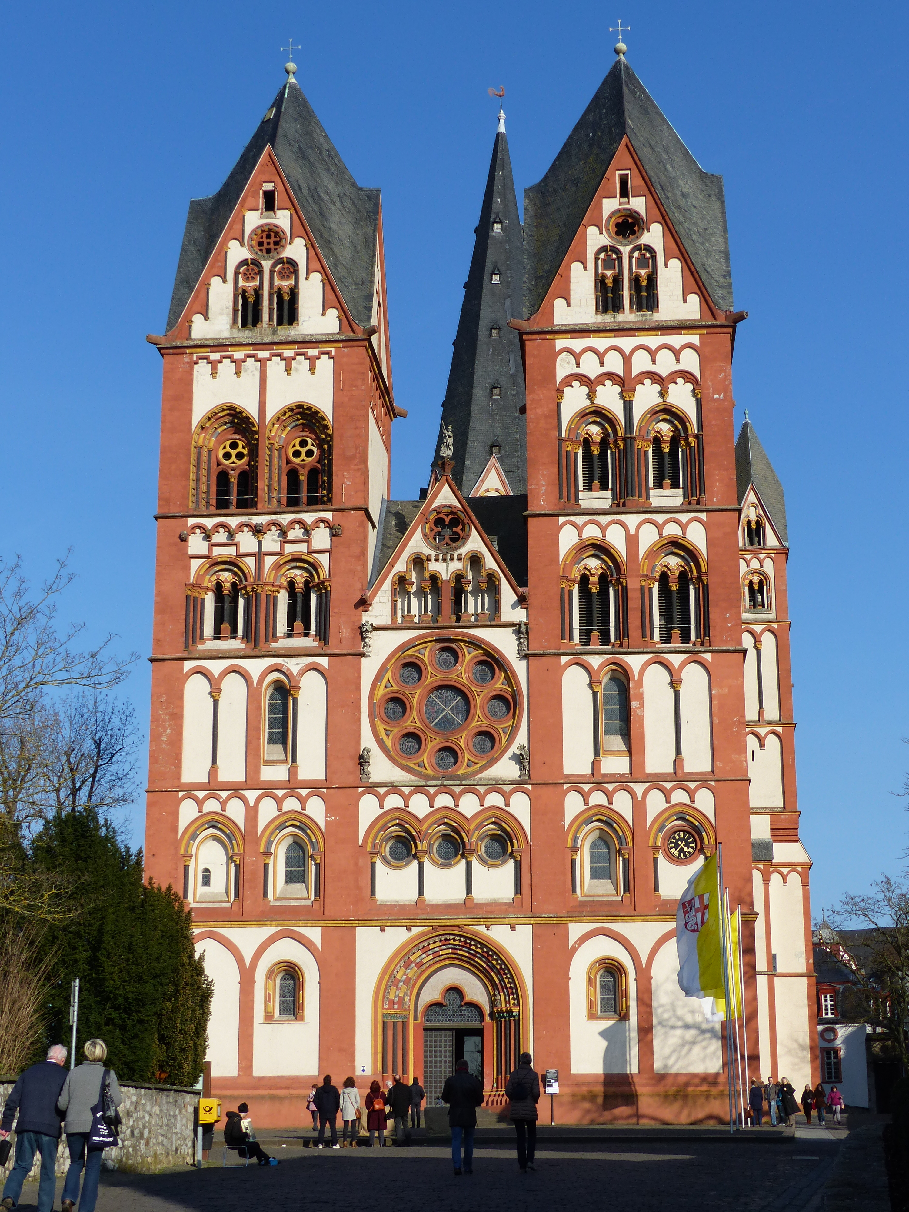 Westfasade des Limburger Doms